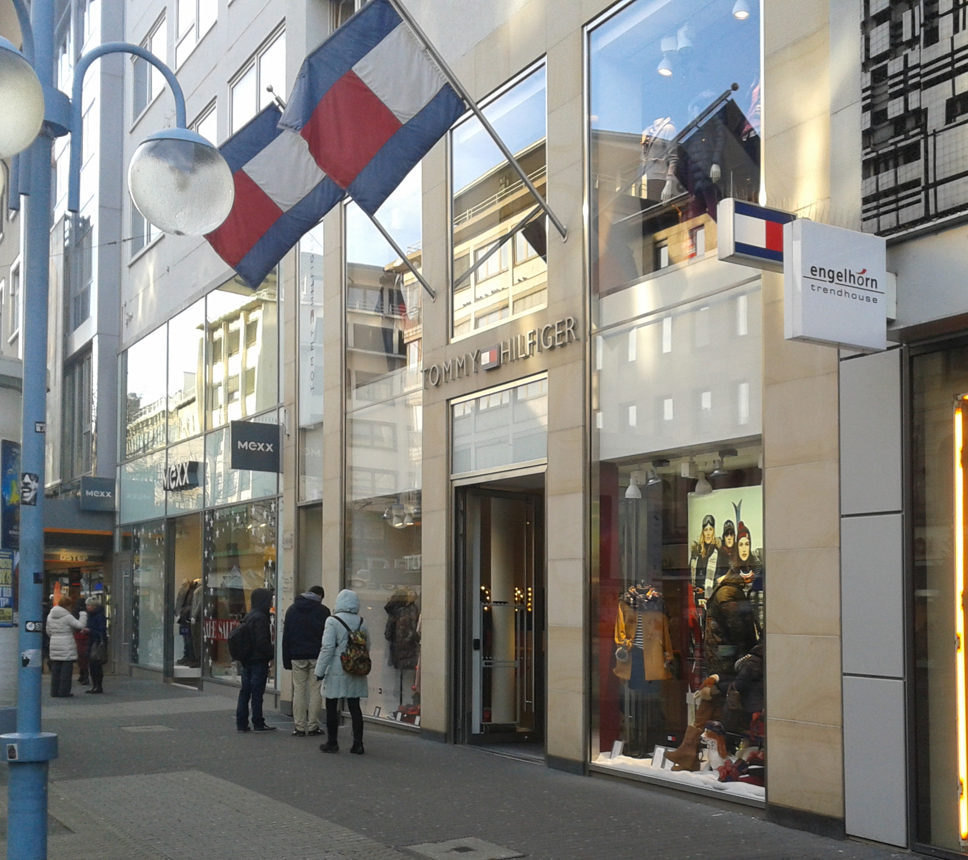 Tommy-Hilfiger-Filiale in Mannheim, O6, an den Planken